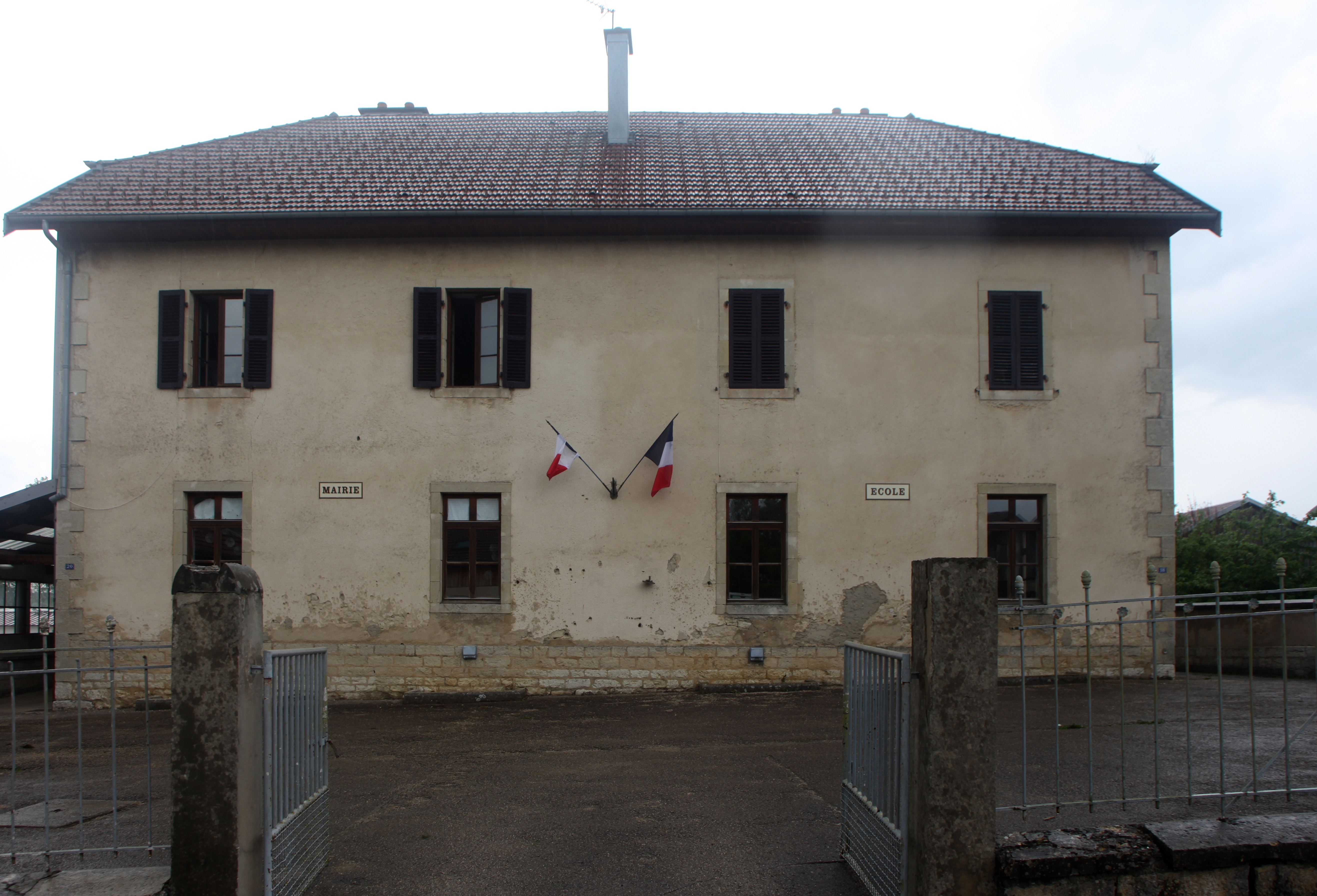 Mairie de Bulle (Doubs).